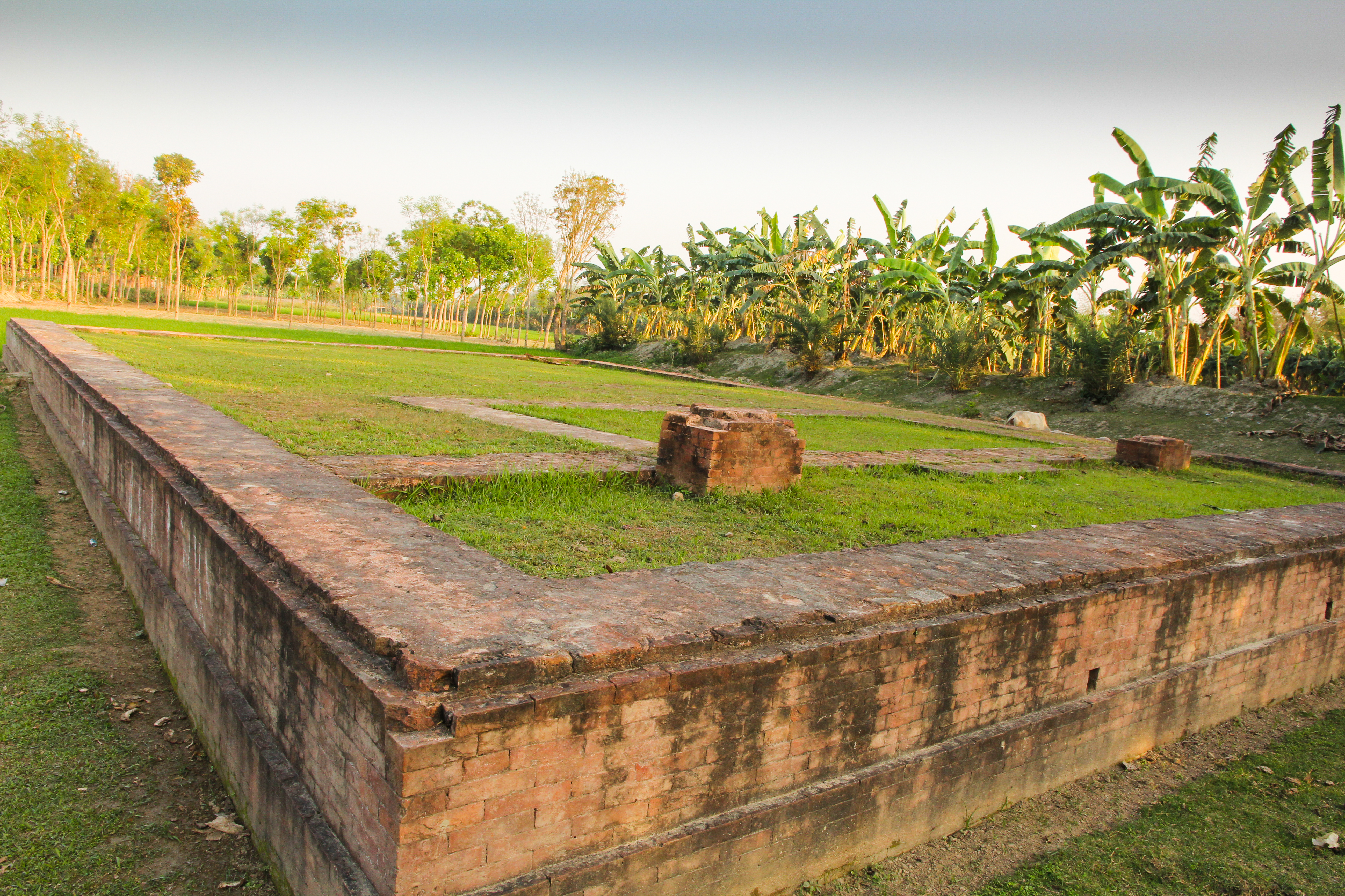 জাহাজঘাট